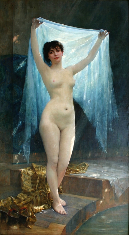 Une Beauté orientale (esqui-djamidja)